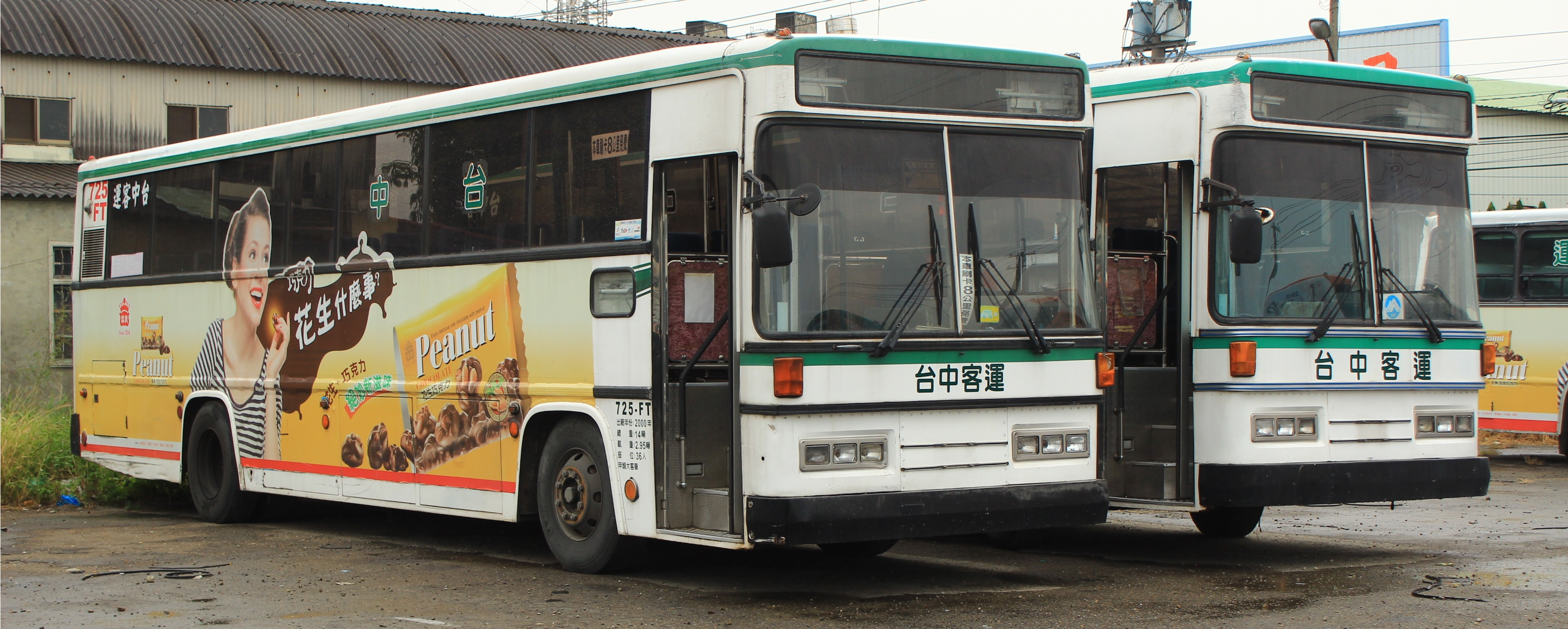 中文（台灣）: 台中客運烏日停車場小國瑞725-FT